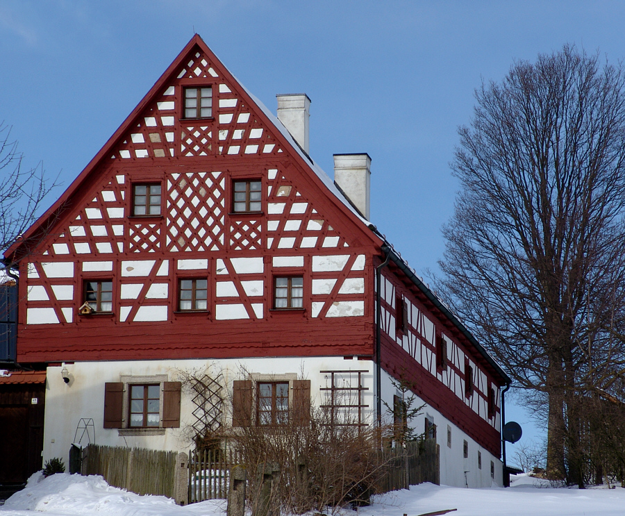 Egerländer Fachwerkhaus in Neualbenreuth (2005) Fotograf: Walter J. Pilsak, Waldsassen Copyright Status: GNU Freie Dokumentationslizenz